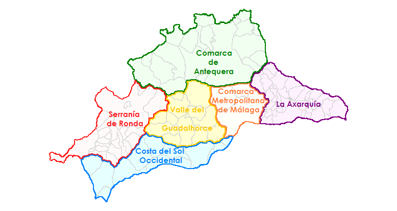 Comarcas de Málaga según la Junta de Andalucía, en el decreto de 2003